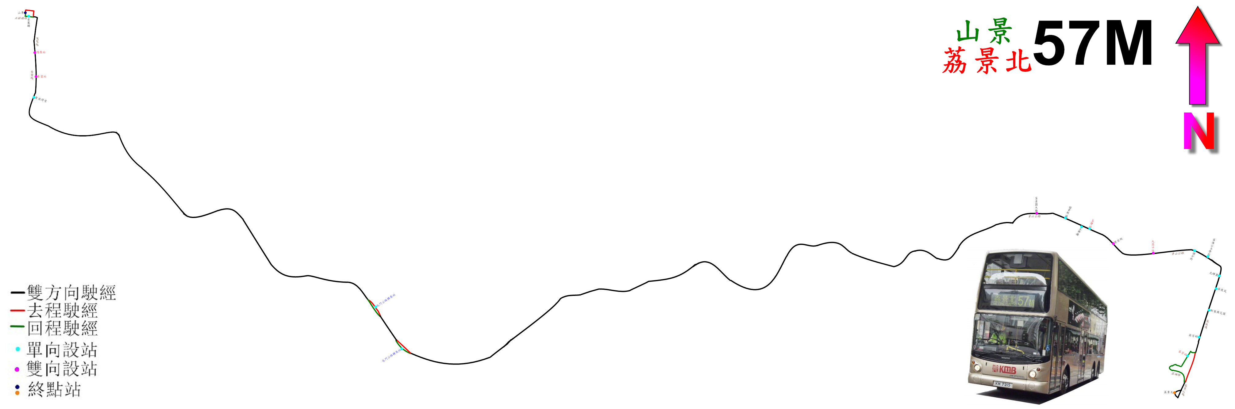 中文（香港）: 九巴57M線的走線圖